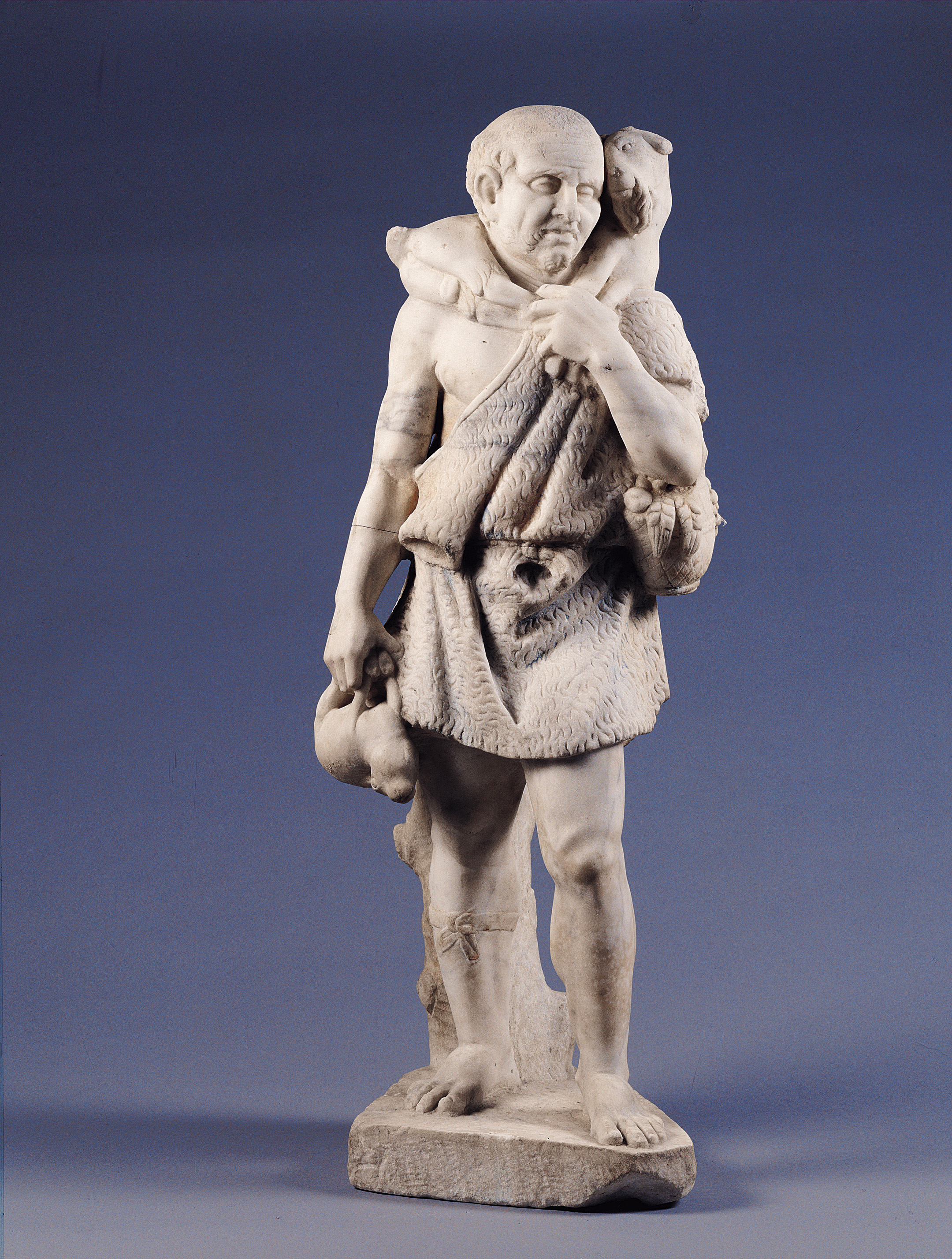 La statuetta del Pastore che ha dato il nome alle villa